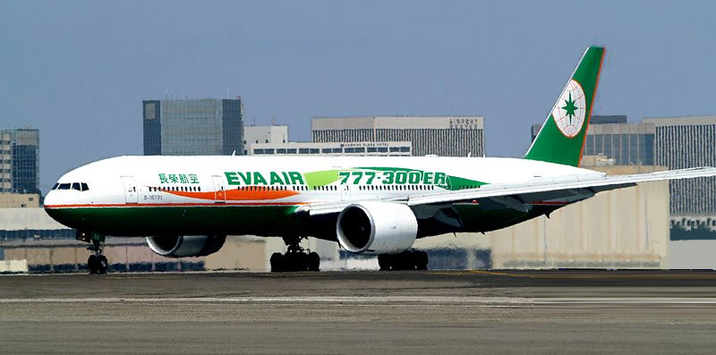 EVA 777